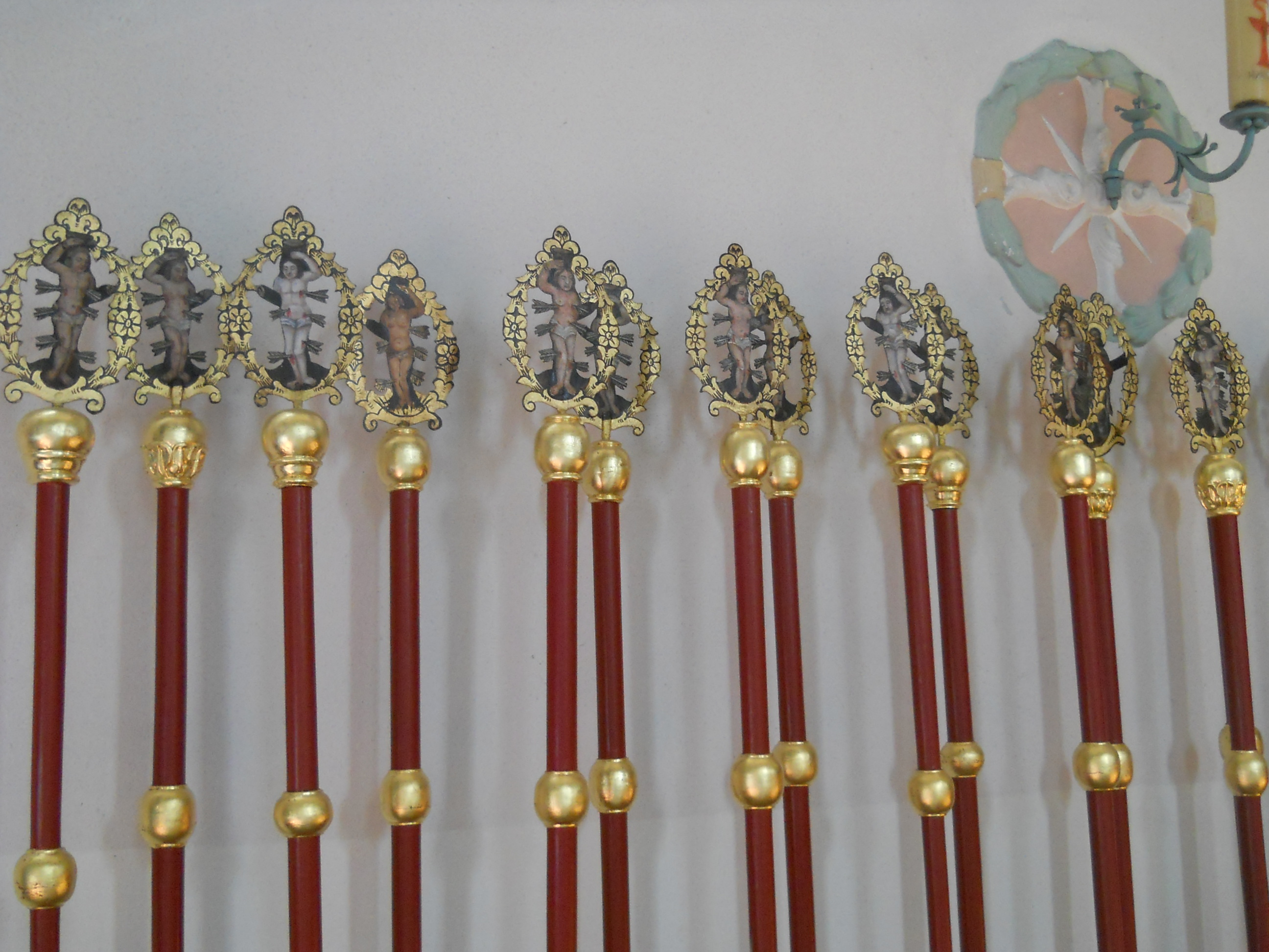 Aurach (Landkreis Ansbach), Kath. Pfarrkirche St. Peter und Paul, Bruderschaftsprozessionsstangen